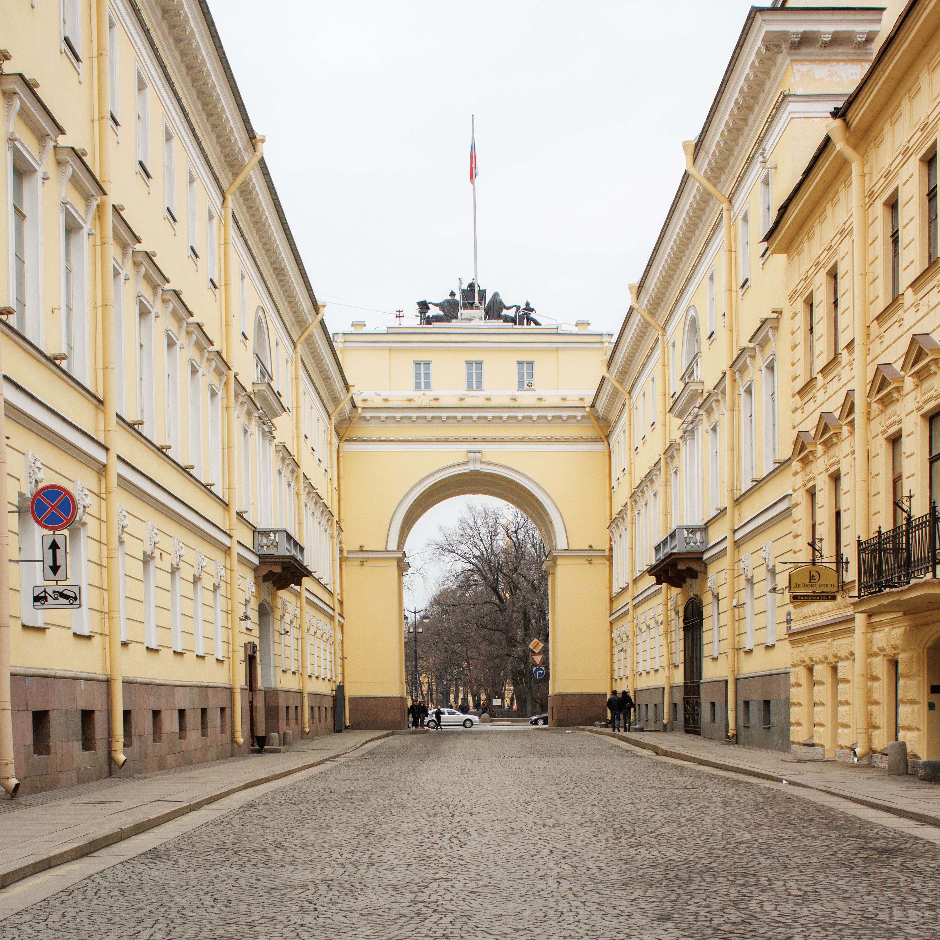 Сенат и Синод: Сенатская площадь, 1, 3, Английская набережная, 2, Галерная улица, 1, 2, Конногвардейский бульвар, 1, Адмиралтейский район, Санкт-Петербург